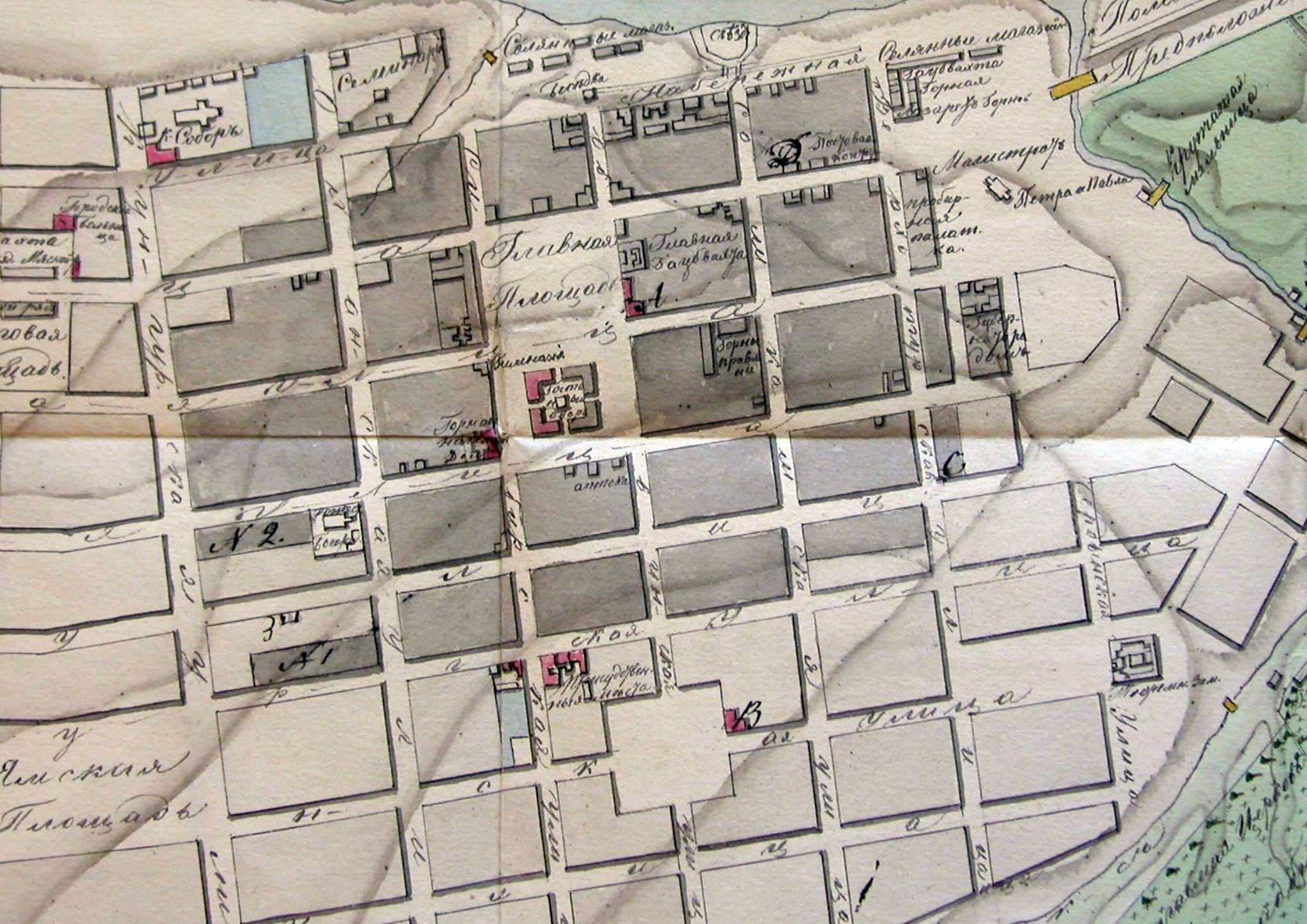 План Перми с указанием строений, пострадавших при пожаре 1842 года. Фрагмент